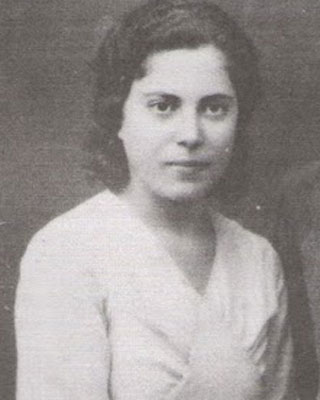 María Silva Cruz, surnommée María La Libertaire (1915-1936) est une militante anarchiste et syndicaliste libertaire espagnole.